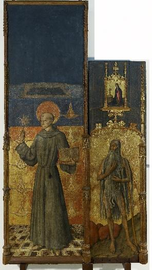 Retablo de san Bernardino de Siena y san Onofre, temple sobre tabla, 310 x 172 cm, Museo de Mallorca